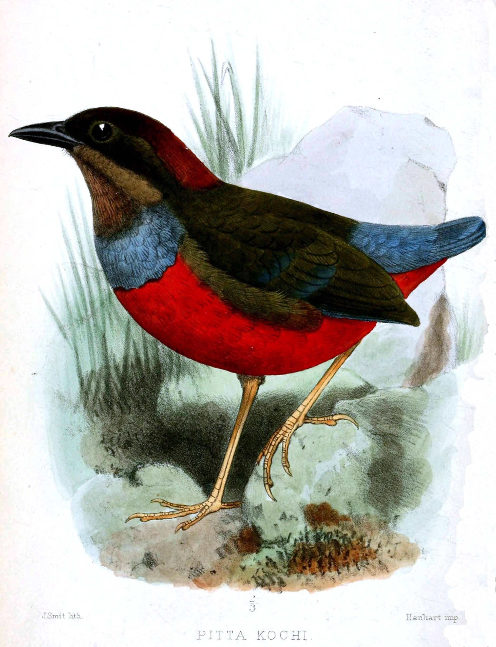 Pitta kochi = Erythropitta kochi